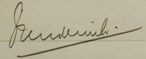 Подпись Пита Вюндеринка